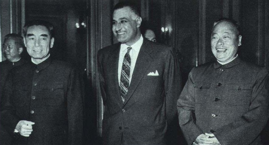 1964-03 1963年12月 中国访问阿联 周恩来 纳赛尔 陈毅